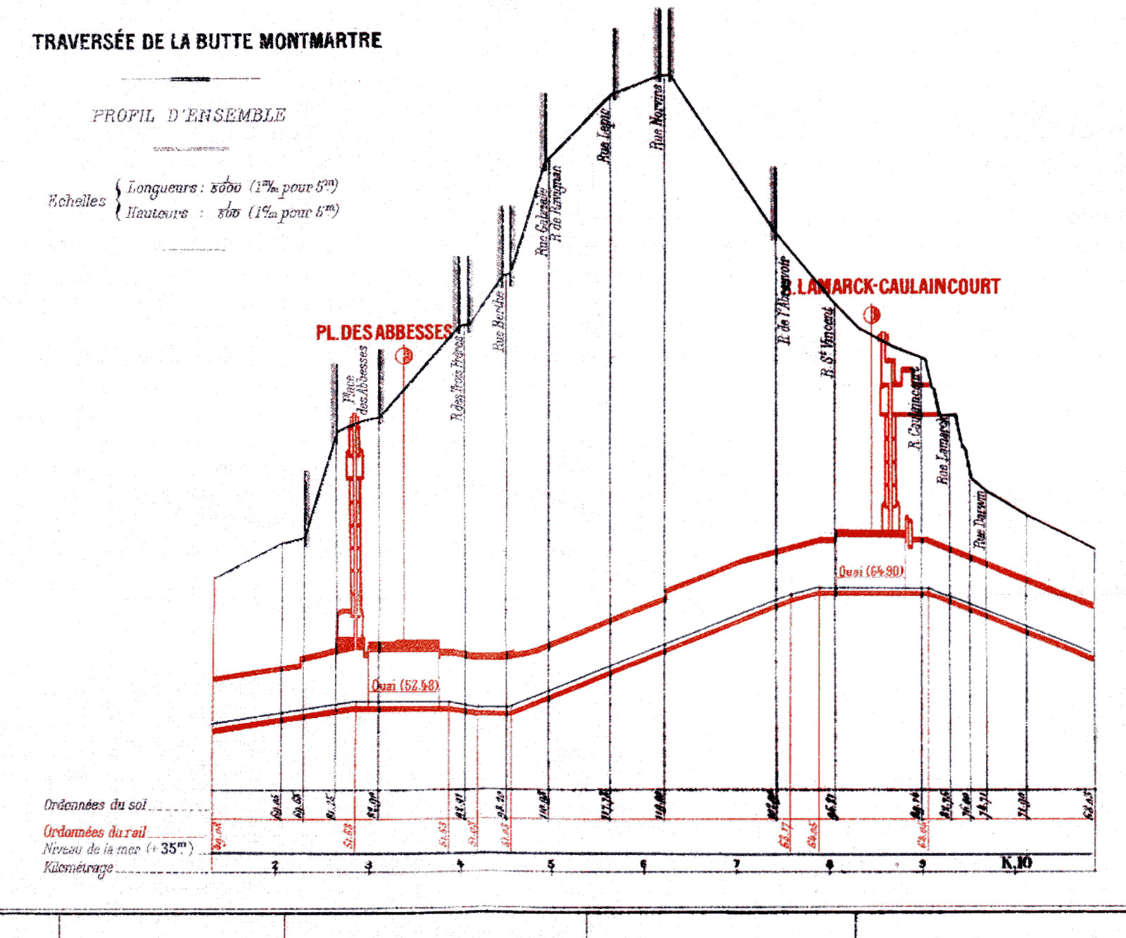 Ligne A du Nord-Sud (actuelle ligne 12 du métro de Paris), France. Profil en long de la traversée de la butte Montmartre.